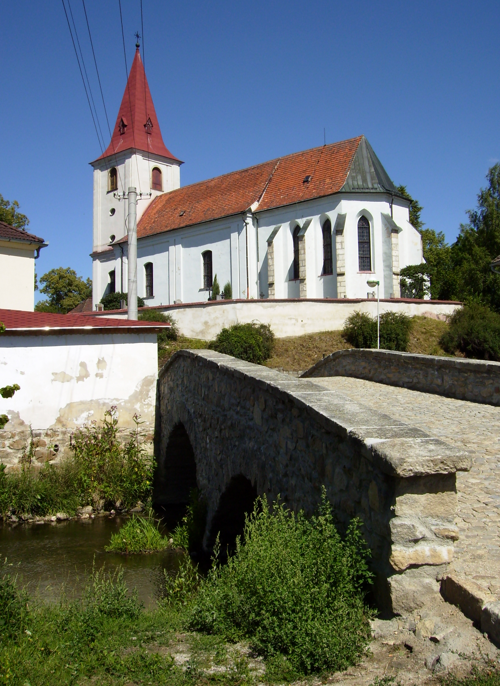 Kostel v Jarošově nad Nežárkou u kamenného mostku